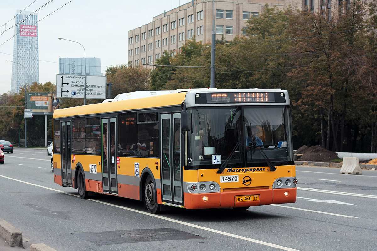 Автобус ЛиАЗ-5292.21 на экспрессном маршруте №902